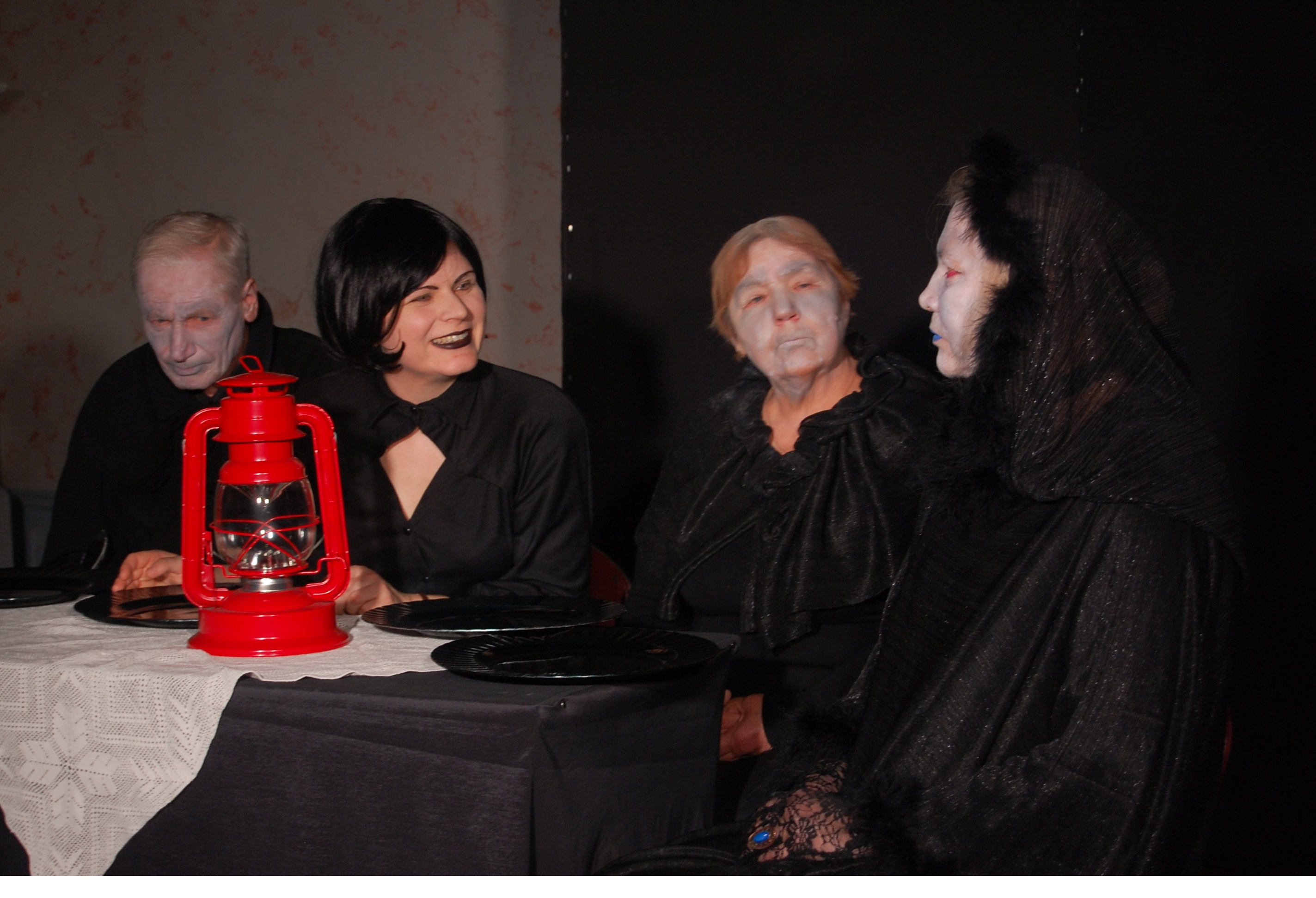 Ingrid Ulst lavastuses "Proua Daam"